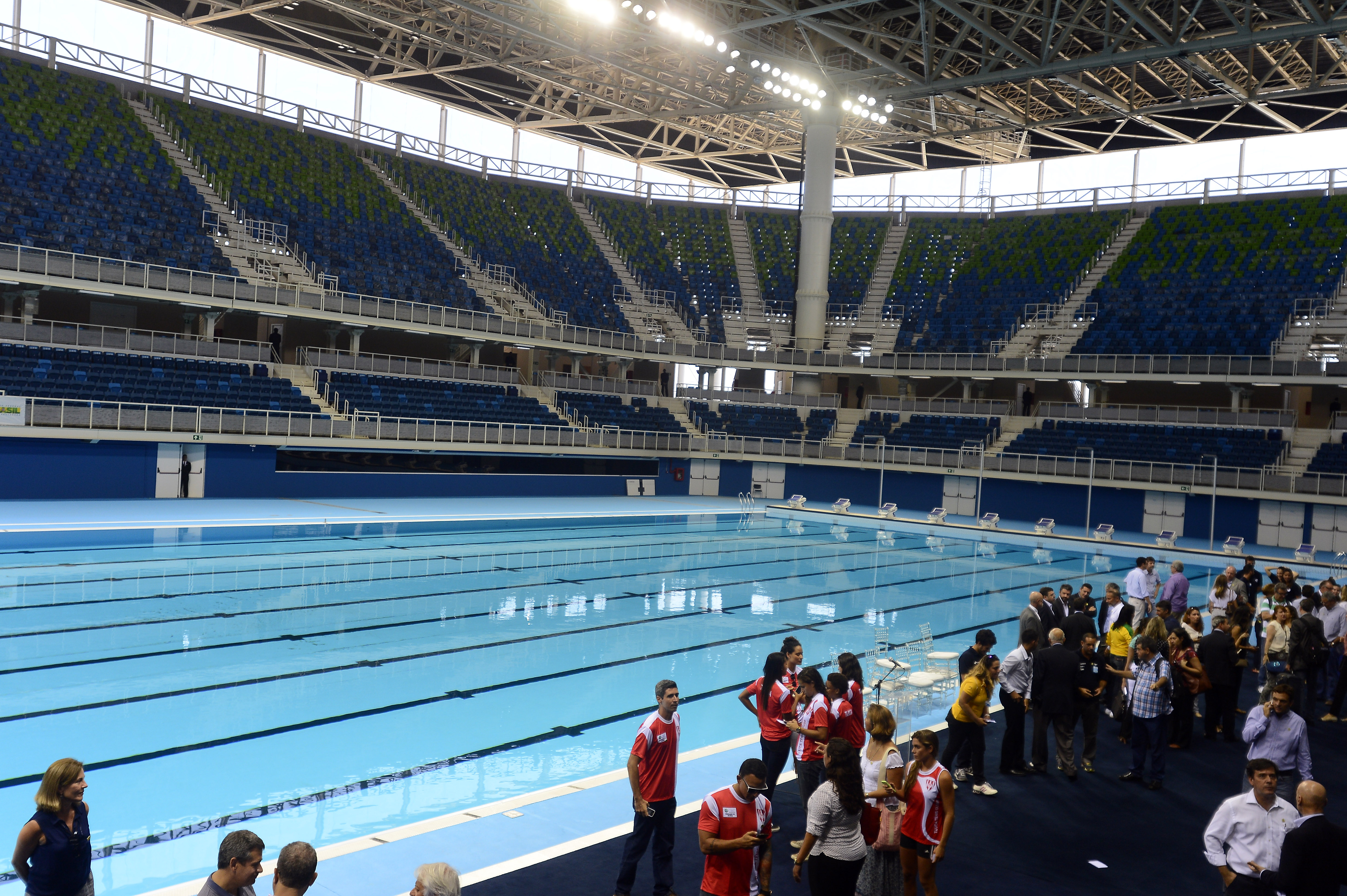 Inaugurazione dell'Estádio Aquático Olímpico di Rio de Janeiro